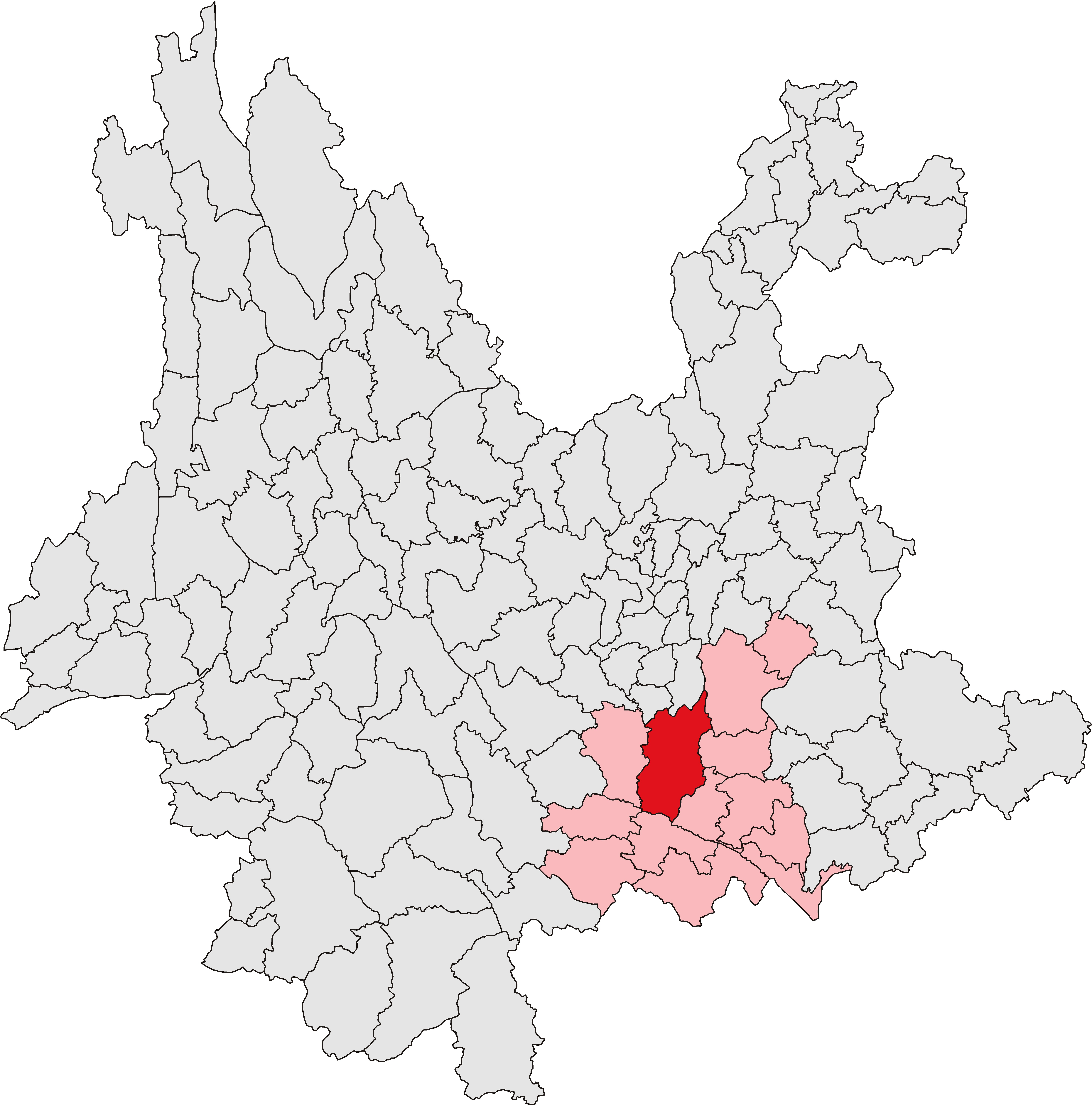 中文（中国大陆）: 建水县位置图